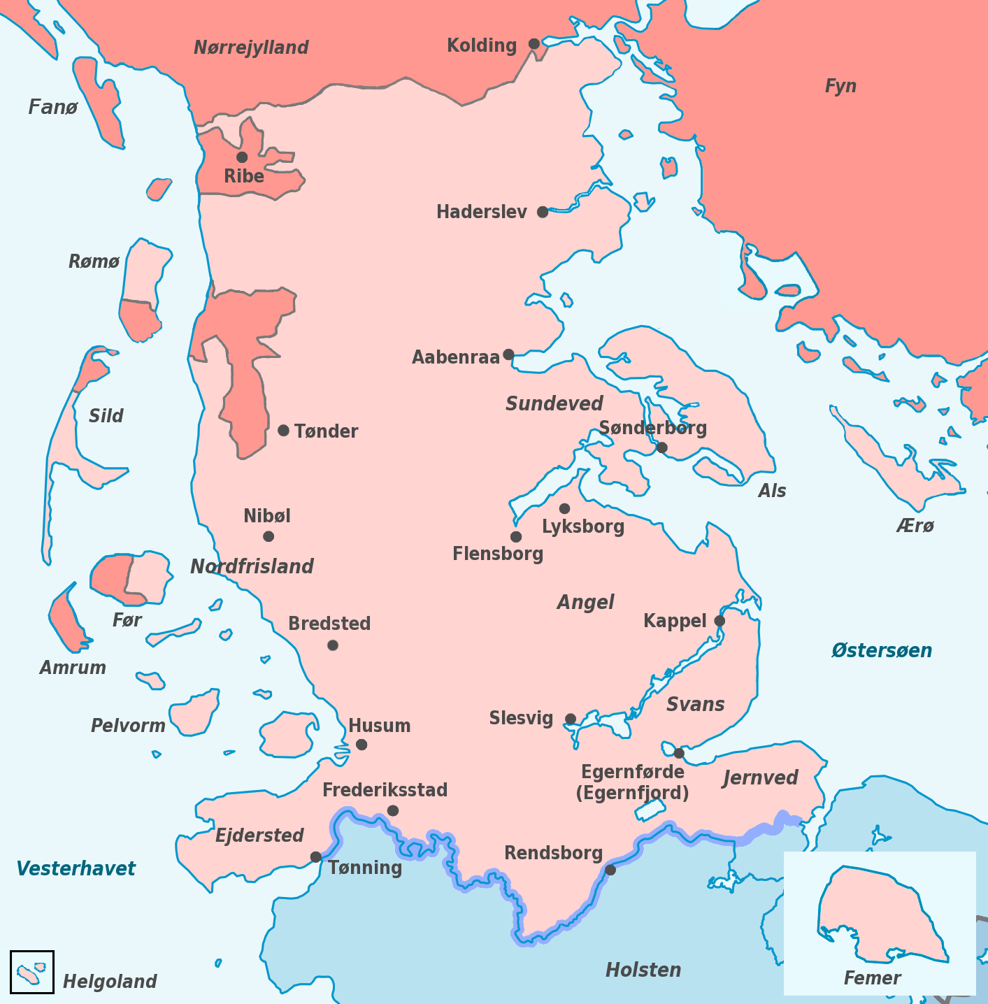 Hertugdømmet Sønderjylland